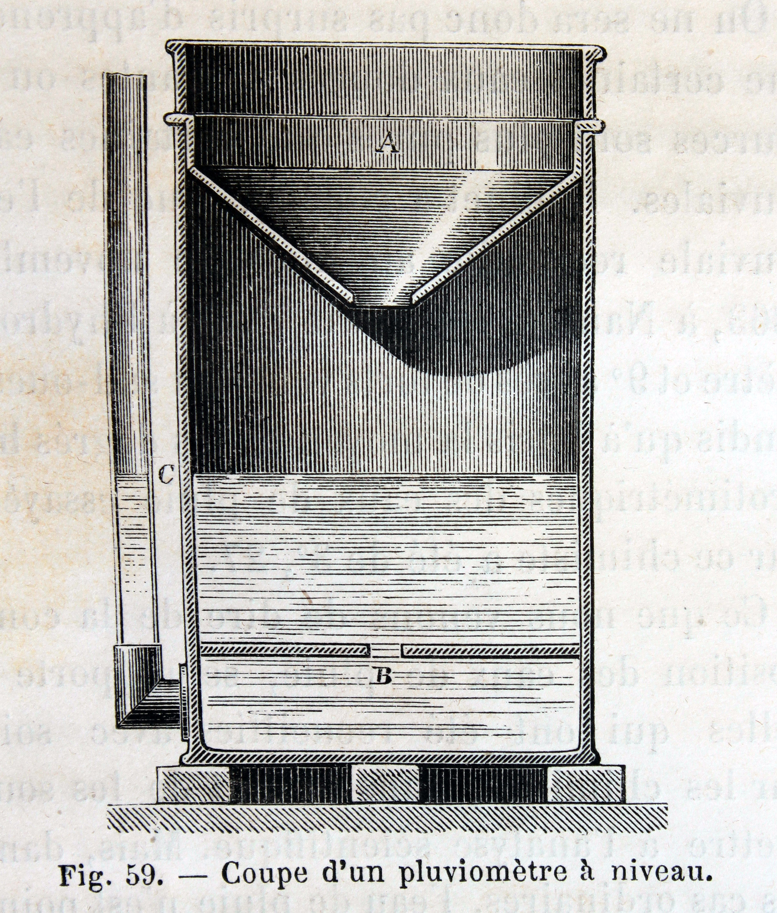 Ilustraciones de la obra : Les merveilles de l'industrie ou, Description des principales industries modernes / par Louis Figuier. - Paris : Furne, Jouvet, [1873-1877]. - Tome III